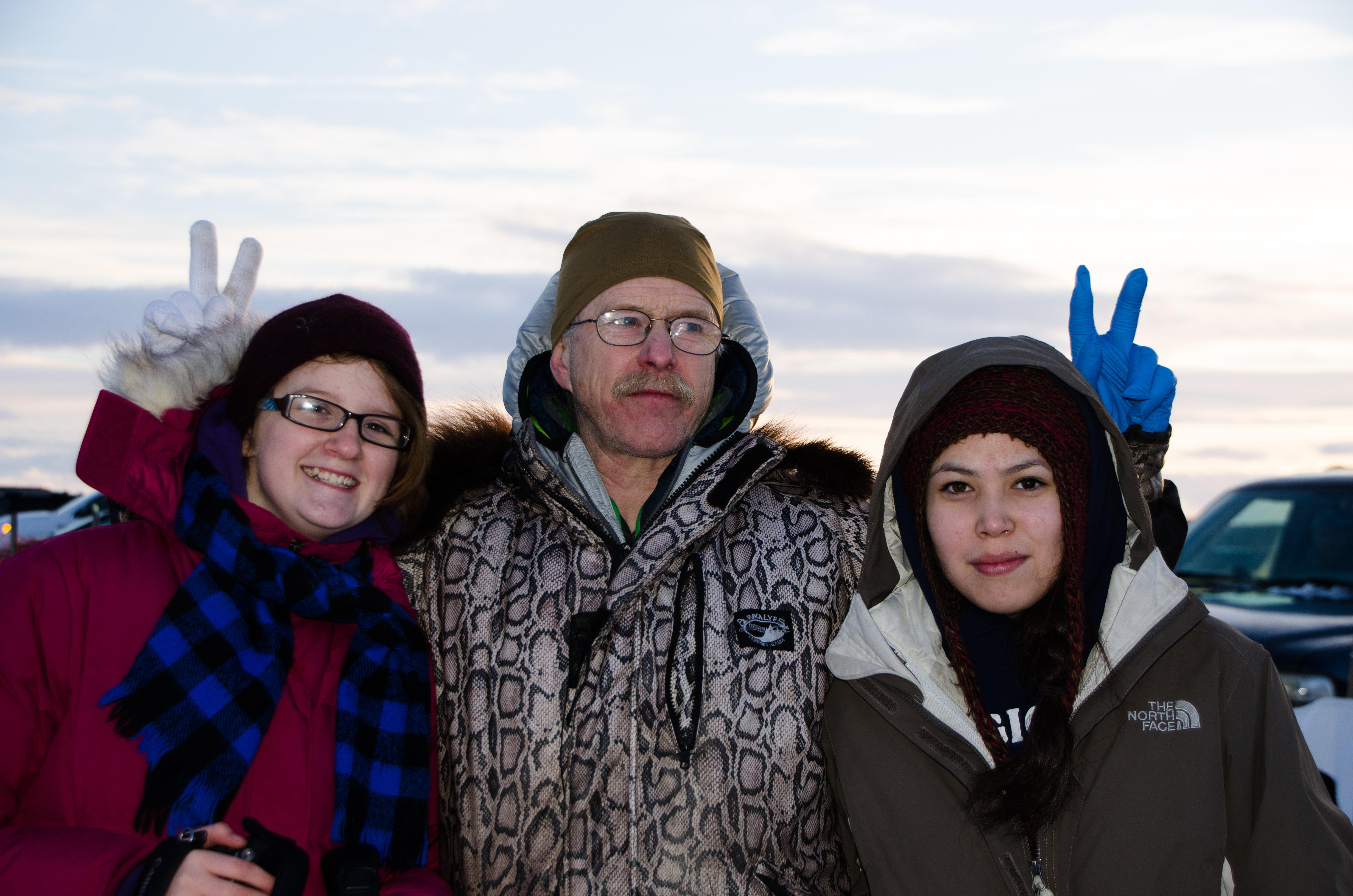 DSC_9671.jpg Kuskokwim 300 2013